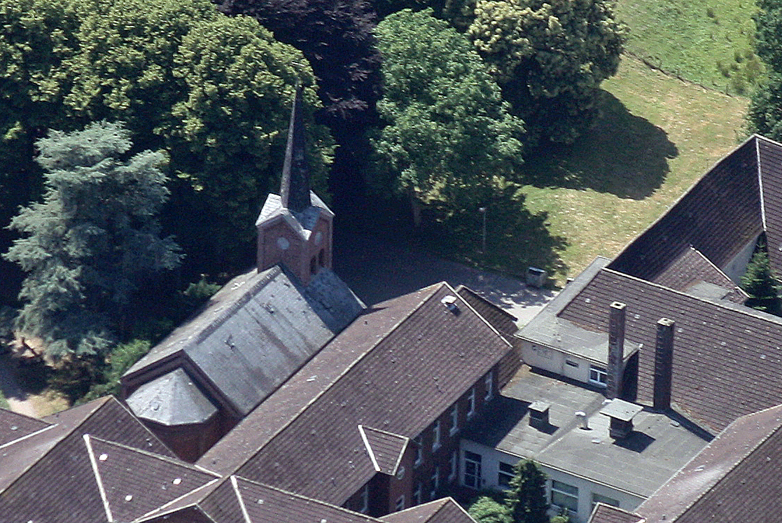 Anlage des ehemaligen Klosters Blankenburg / (Flug über Oldenburg; von Wilhelmshaven kommend nach Hatten; Flughöhe 500 m = 1500 ft; Juli 2010)